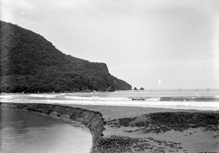 Negatief. Gezicht vanaf het strand van "Pantjer" Poeger bij Djember op de zeilen van binnenkomende prauwen